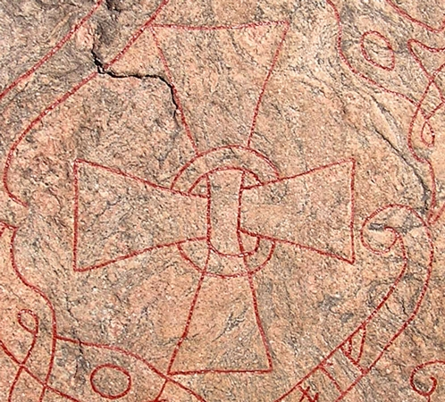 Sö109 kors